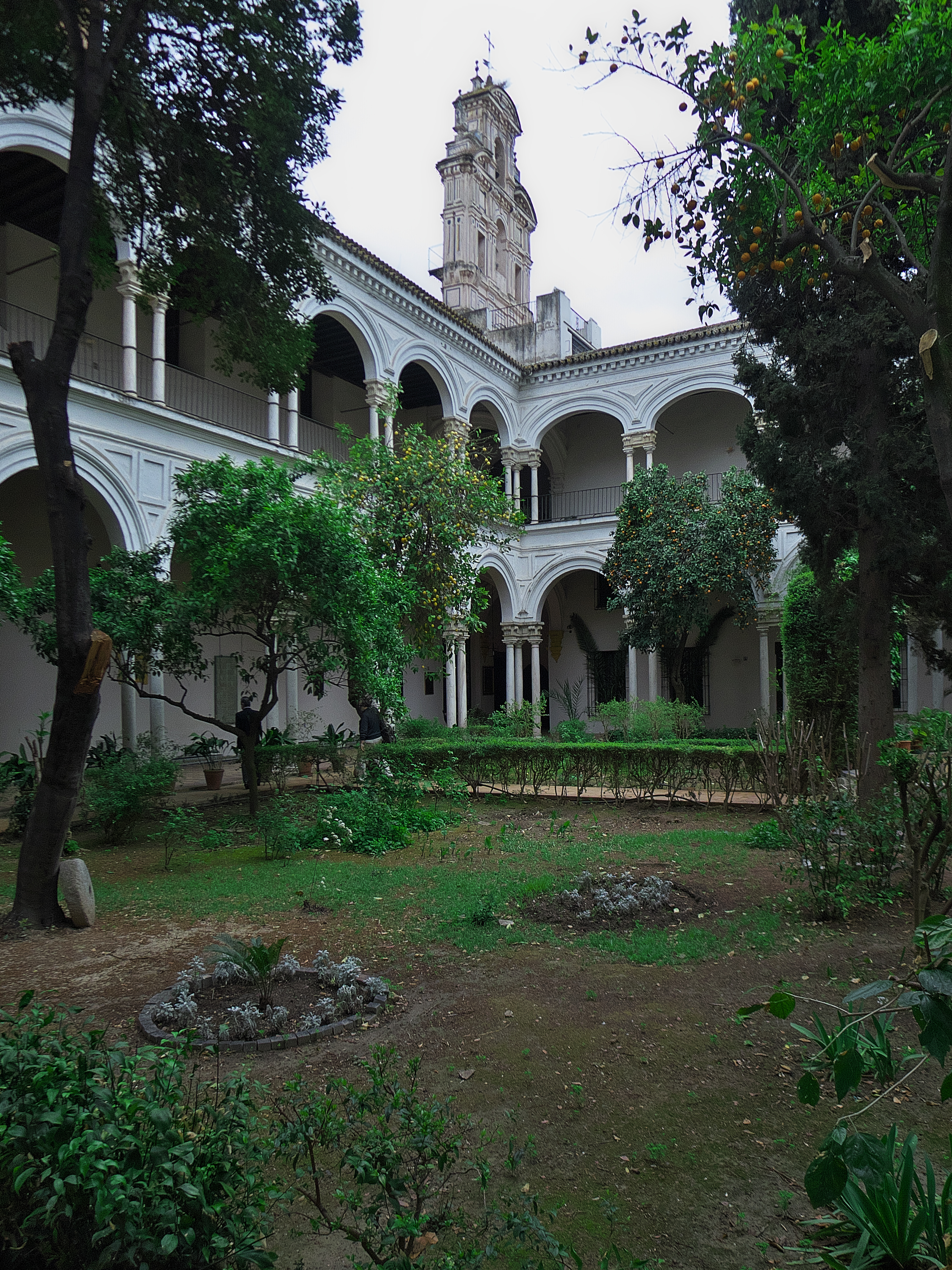 Diego López Bueno y Miguel de Zunárraga, trazan el claustro principal del monasterio (1615-1617), siendo ejecutado por Juan de Segarra